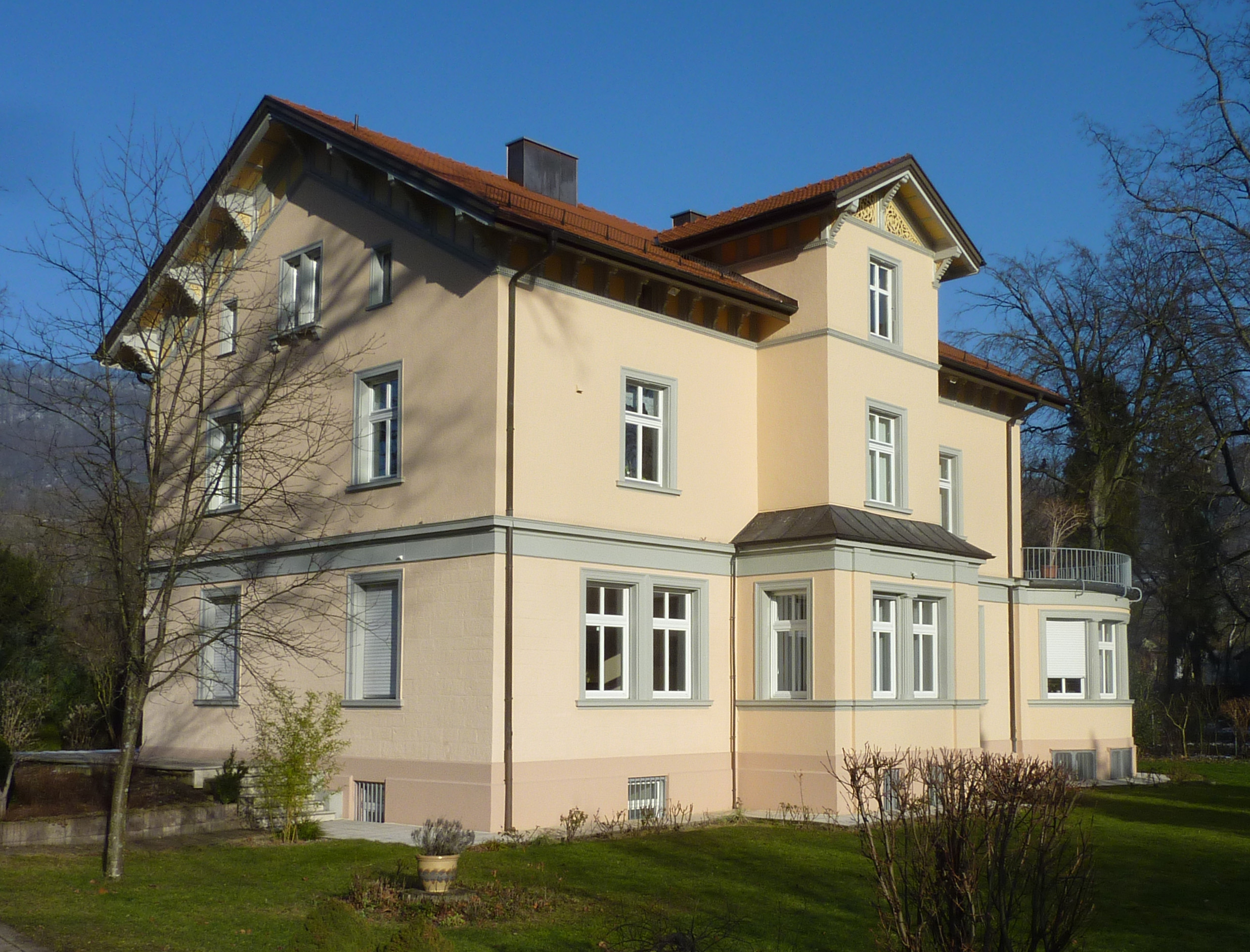 Die 1862 erbaute Fabrikantenvilla bei der Historischen Arbeitersiedlung Kuchen.